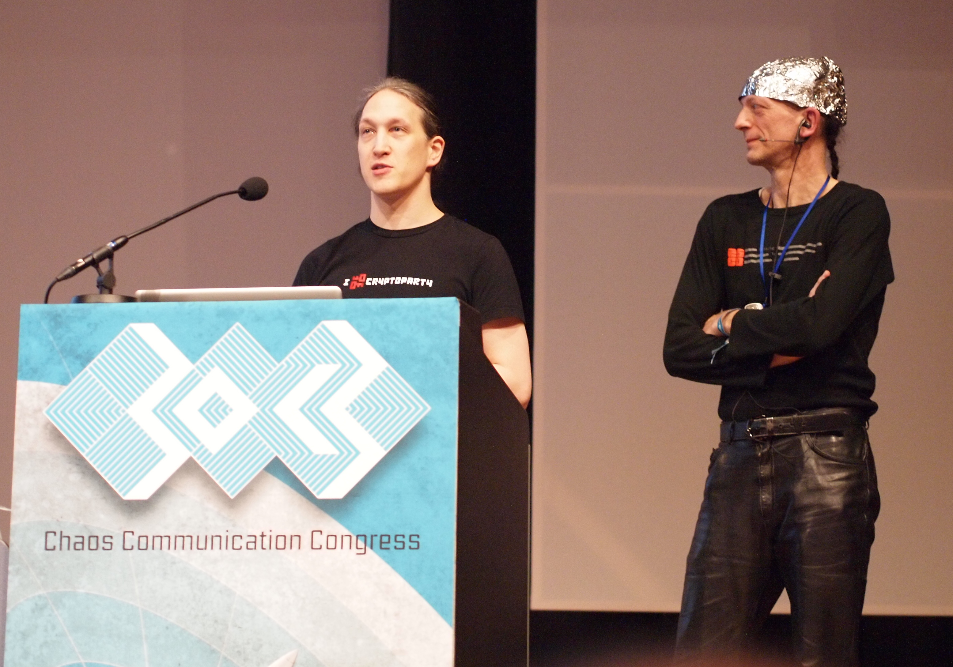 Mann mit Aluminium-Hut auf dem 30C3